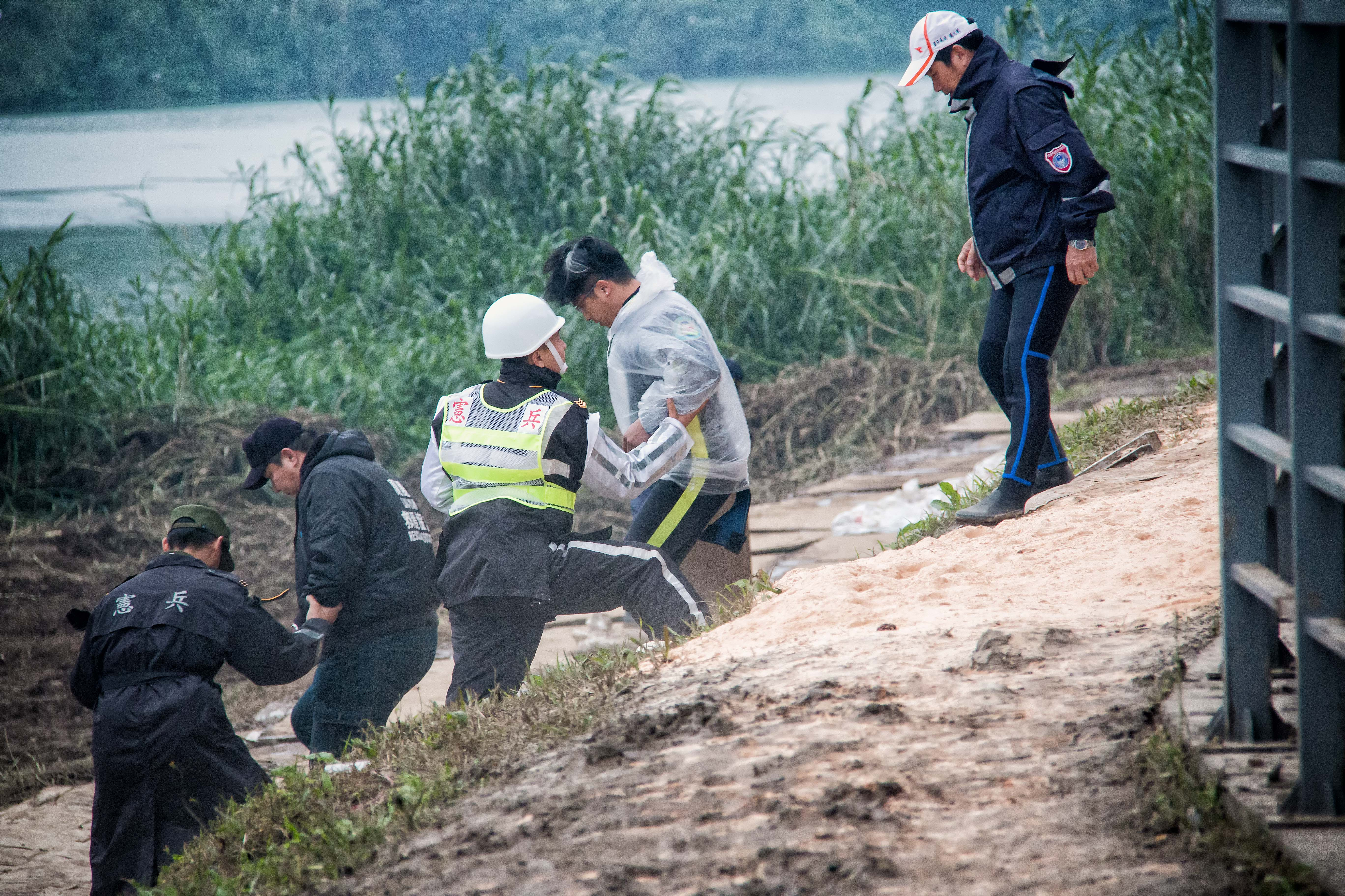 中文（台灣）: 中華民國憲兵參與搜索。